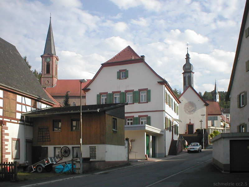 Ortsmitte von Elztal-Dallau: evangelische Kirche (links), kath. Pfarrhaus (mitte) und kath. Kirche (rechts)